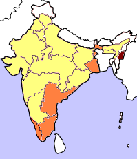 Lok Sabha 1998. Gjord av Soman.